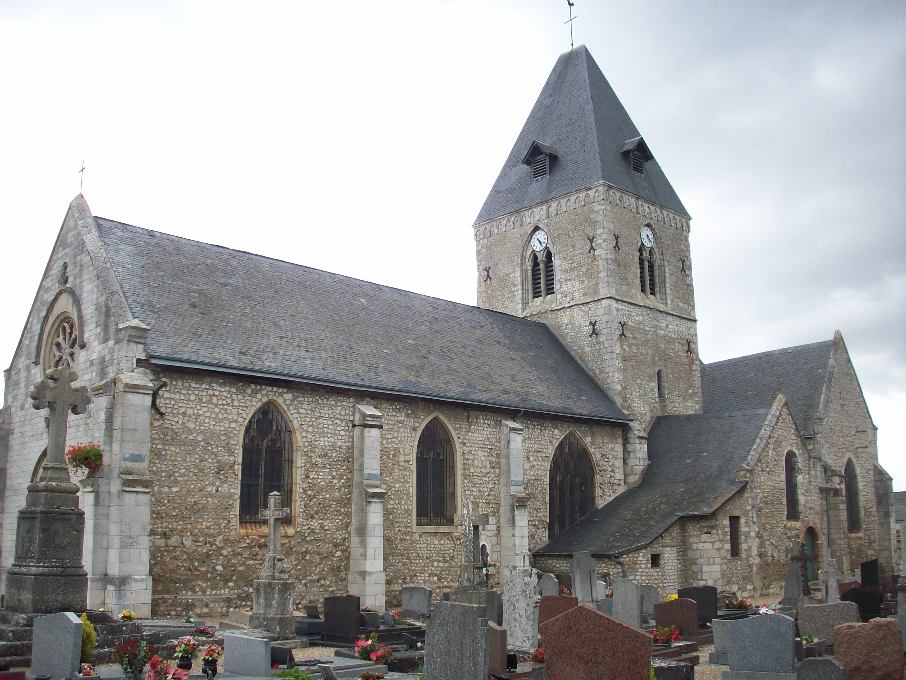 Eglise de Pîtres